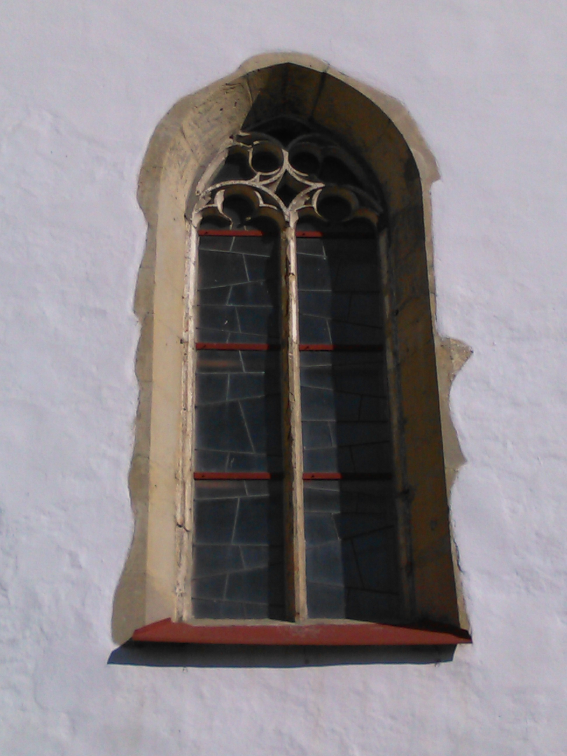 Okno južného priečelia